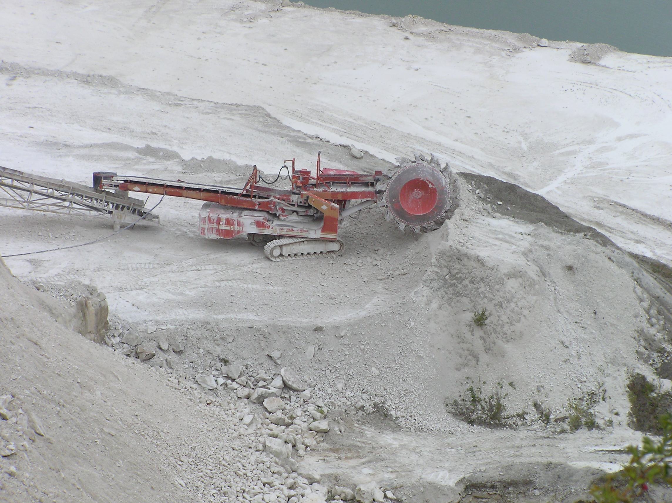 Kalkabbau Lägerdorf